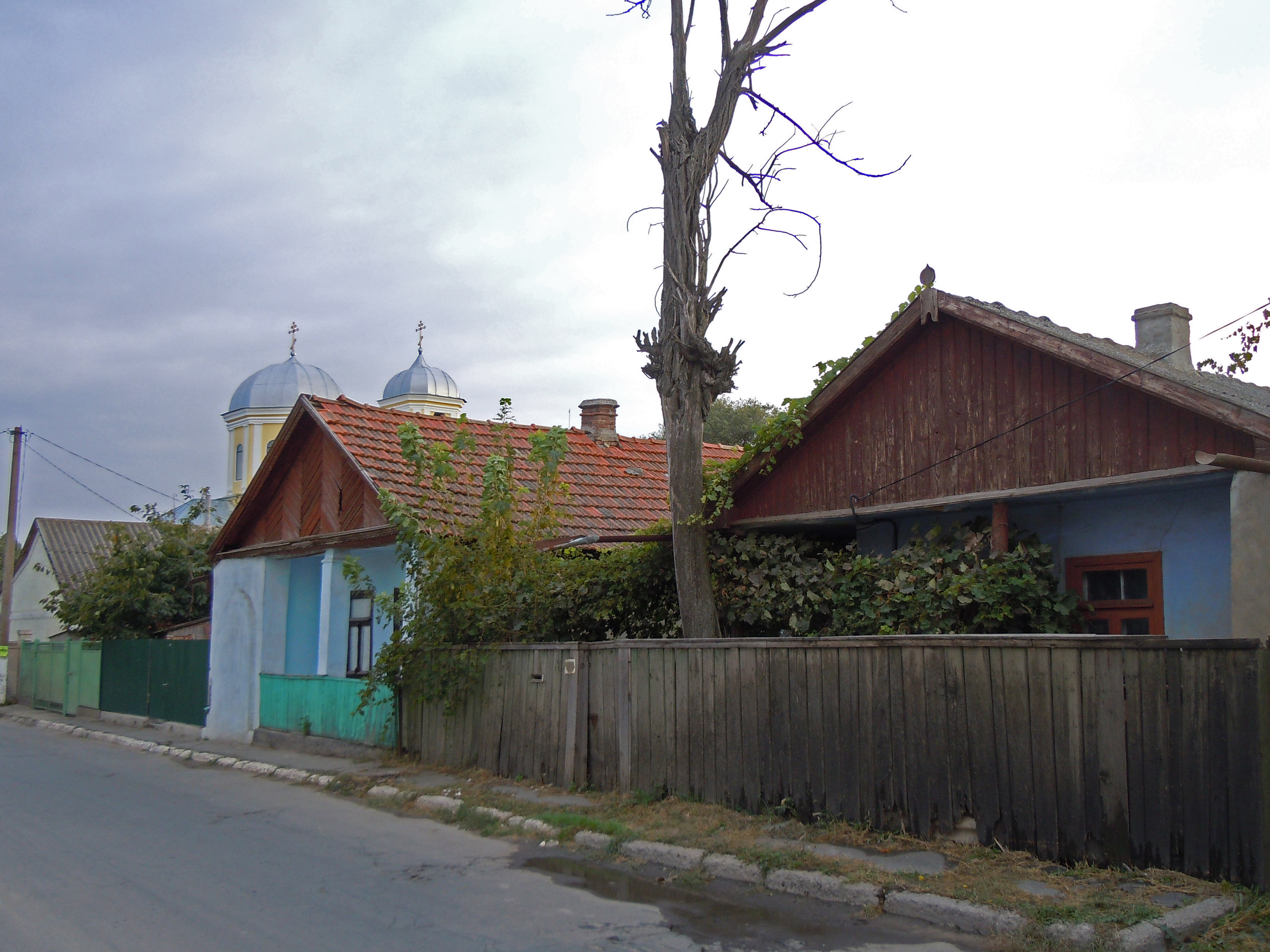 Вулиці Рені